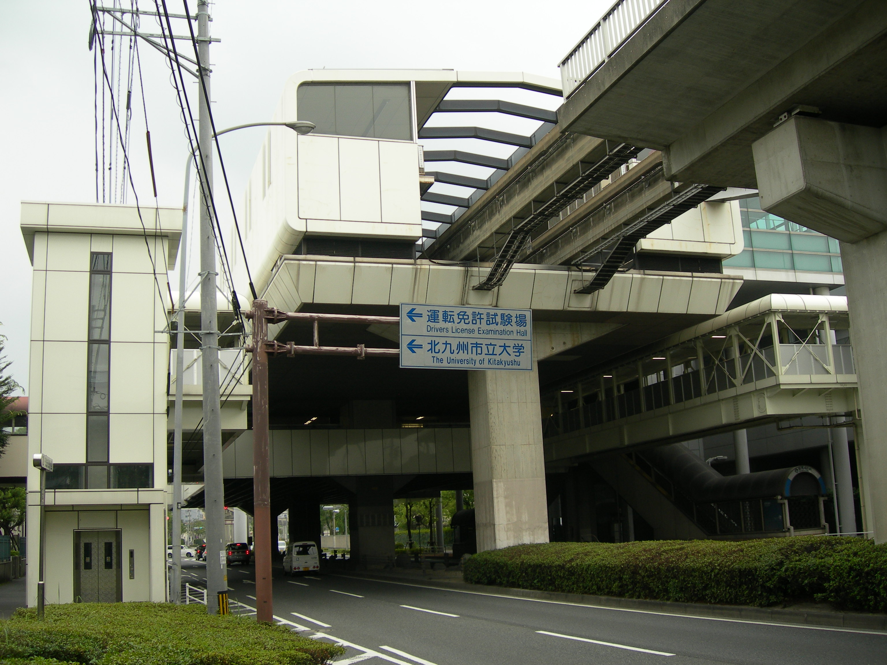 競馬場前駅 (福岡県)